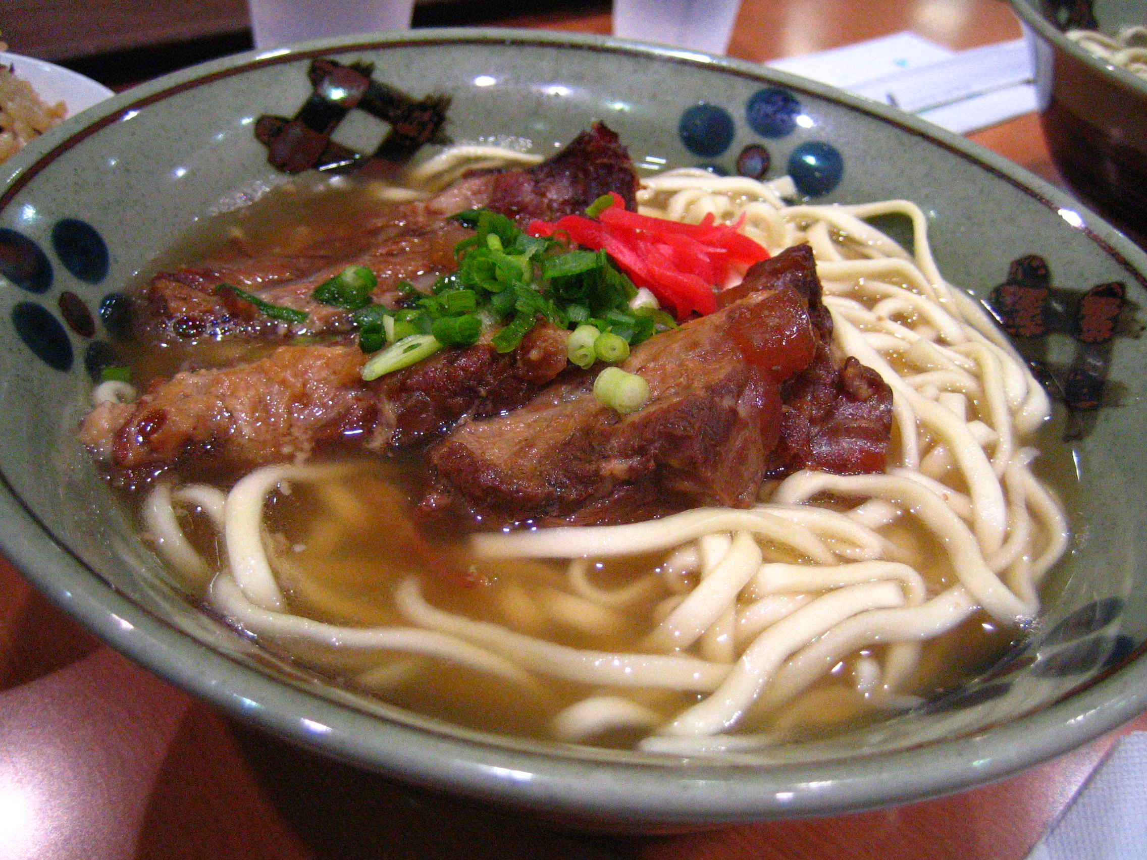 at San-ei, Naha, Okinawa